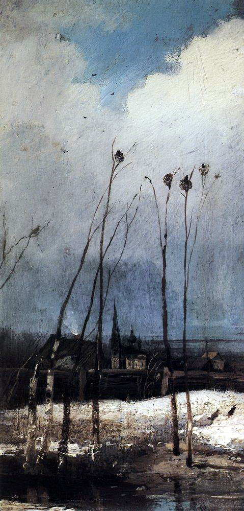 Грачи прилетели. Этюд